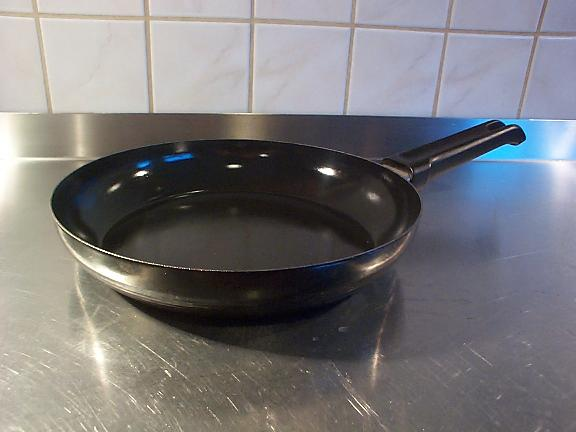 Emaillierte Pfanne (BEKA) (pan enamel)